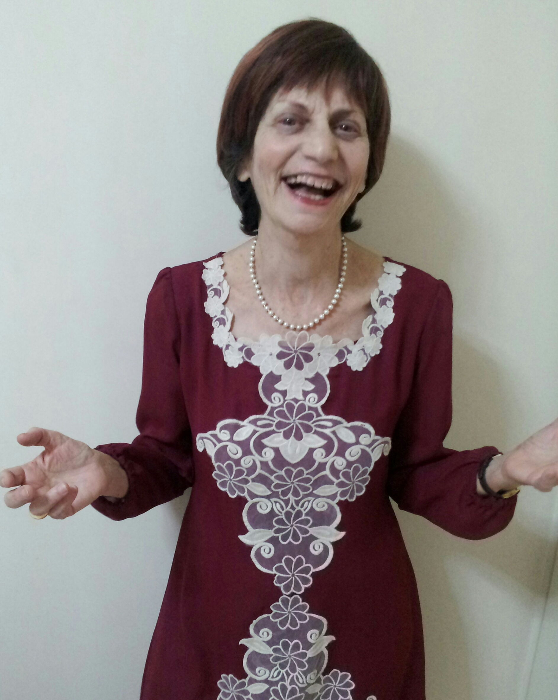 חנה בר - סופרת ומשוררת ילדים ונוער